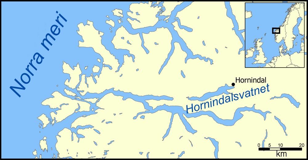 Hornindalsvatneti kaart